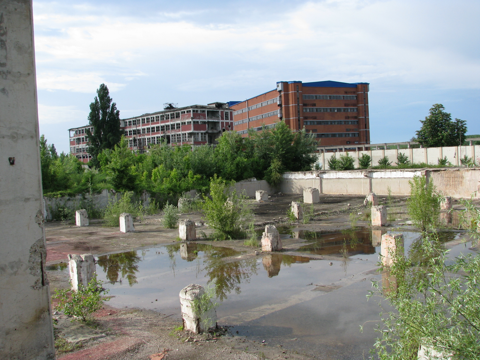 Ostaci zgrade Borovo Commercea u Vukovaru